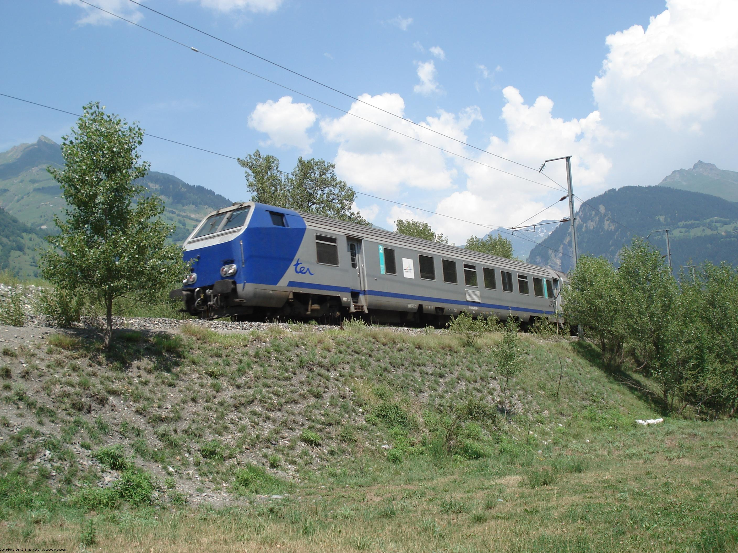 Une voiture Corail pilote B6Dux en livrée TER Rhône Alpes Auteur : Bras Cyril